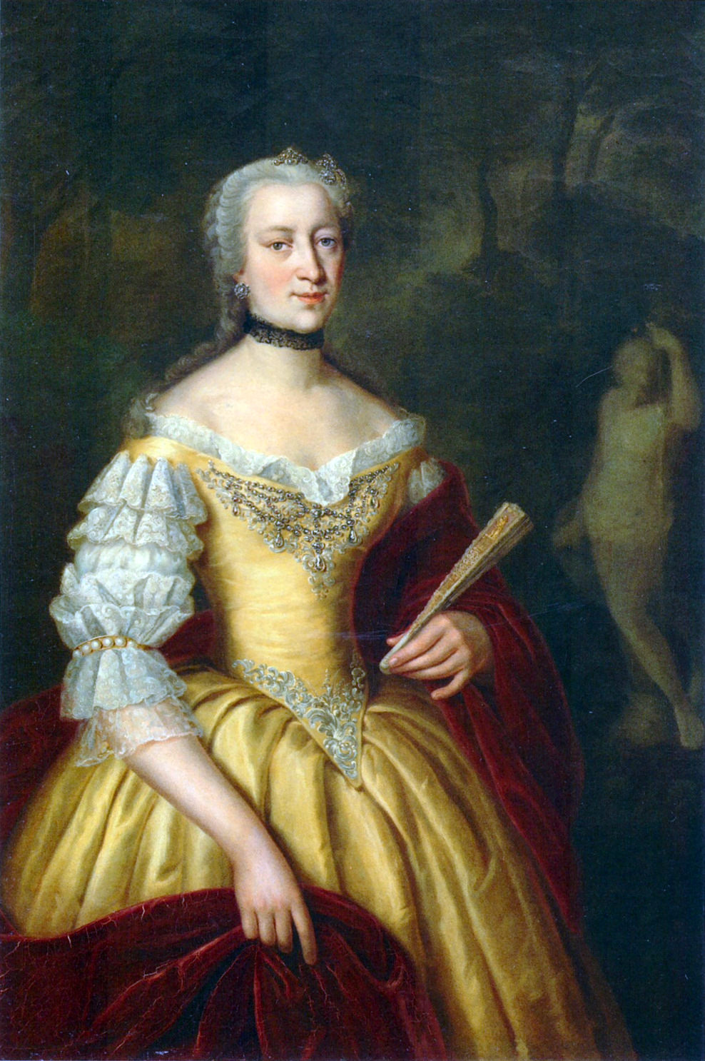 Bernhardina von Plettenberg, verheiratete Gräfin von Schönborn